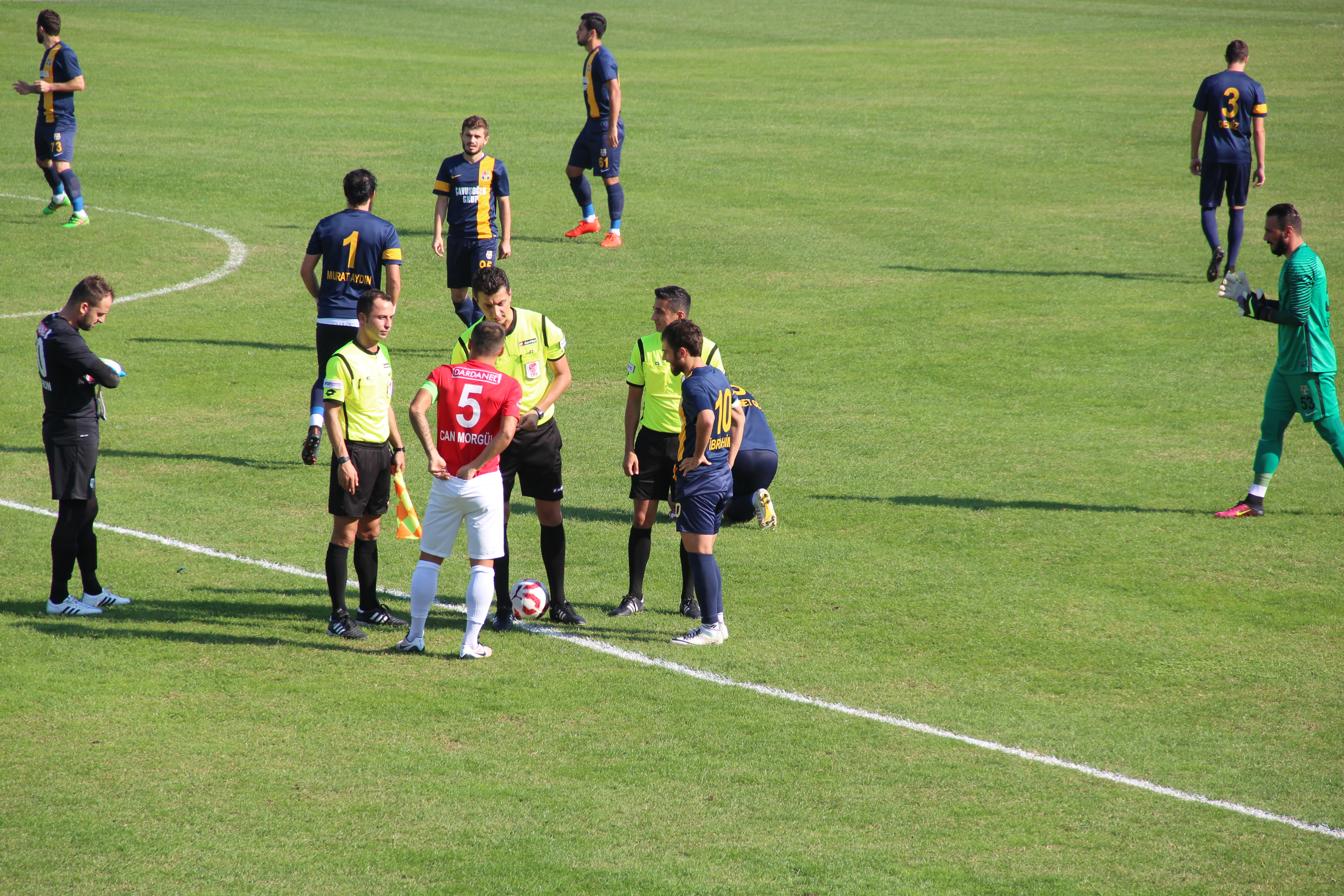 Derincespor 53 - İlker Günay, 3 - Deniz Durmuş, 41 - Zafer Doğan, 61 - Emre Kaba, 95 - Abdülkadir Kaba, 8 - Samet Gül, 14 - Aykut Köz, 37 - Ahmet Güney, 73 - Raif Gündoğdu, 1 - Murat Aydın, 10 - İbrahim Gürel Dardanelspor 90 - Ceyhun Demircan, 2 - Sinan Akgöl, 17 - Bedri Evren, 20 - Ahmet Sönmez, 23 - Ahmed Emir Tekçam, 5 - Can Morgül, 7 - Batuhan Irmak, 21 - Ömer Sümer, 98 - Mertcan Dursun, 9 - Uğur Uğur, 14 - Ufukcan Engin Hakemler: Burak Kalkandelen, Emrah Akkaya, Ahmet Yaşılak, Ahmet Yaşılak